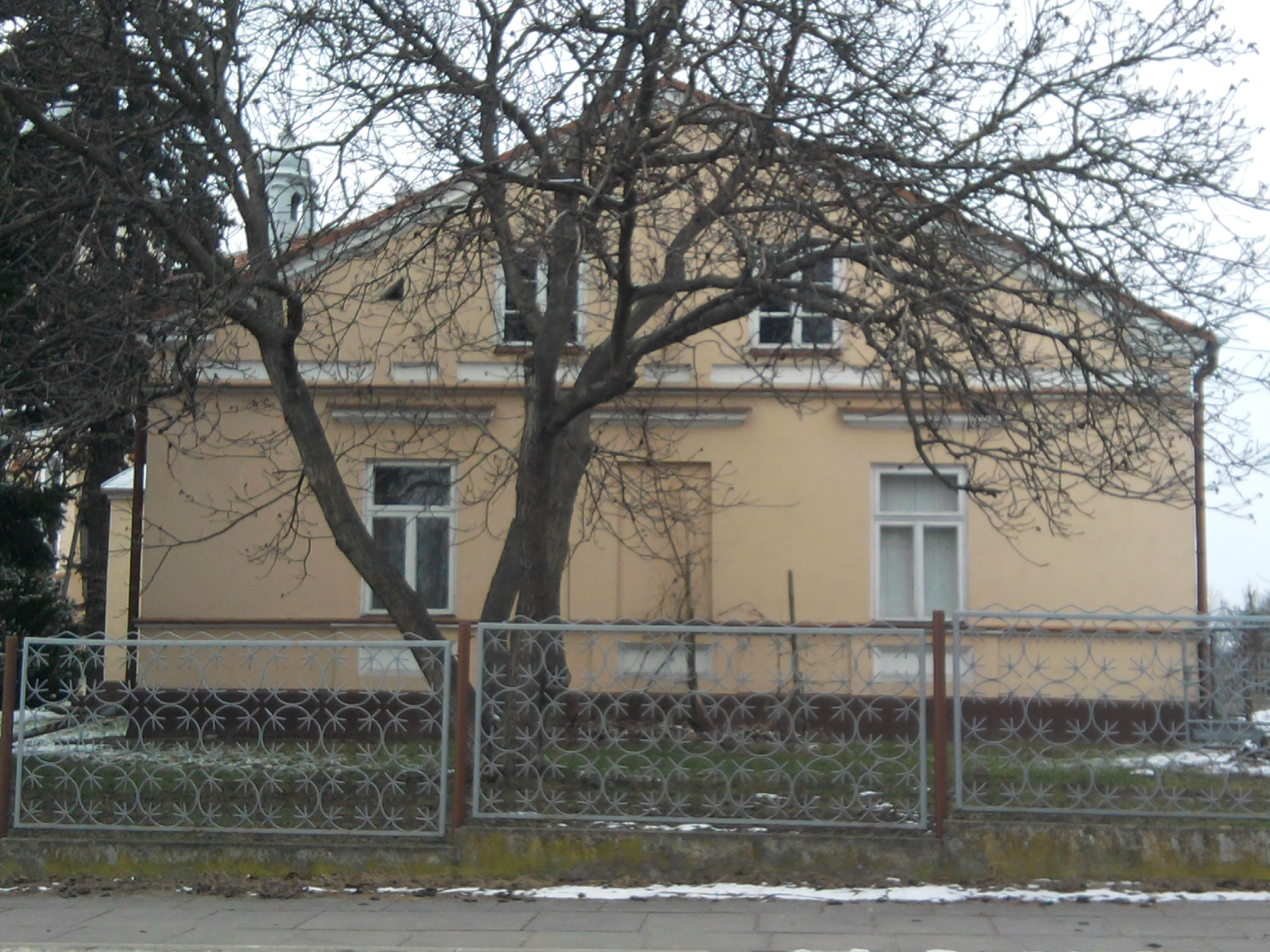 Plebania kościoła św. Małgorzaty w Zadzimiu